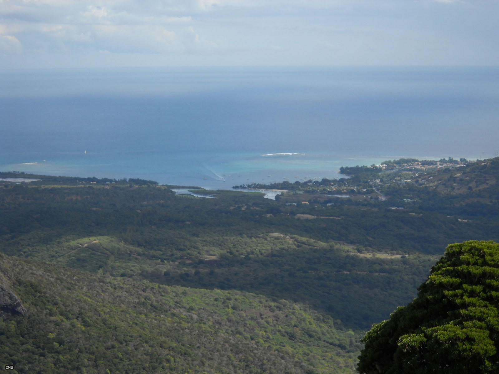 Tamarin